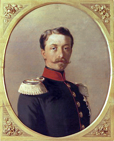 Großherzog Friedrich I. von Baden